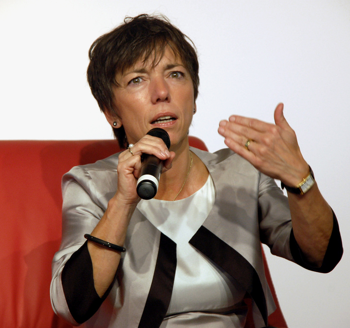 Bischöfin Margot Käßmann bei einer Podiumsdiskussion beim Deutschen Evangelischen Kirchentag 2009 in Bremen, Deutschland.